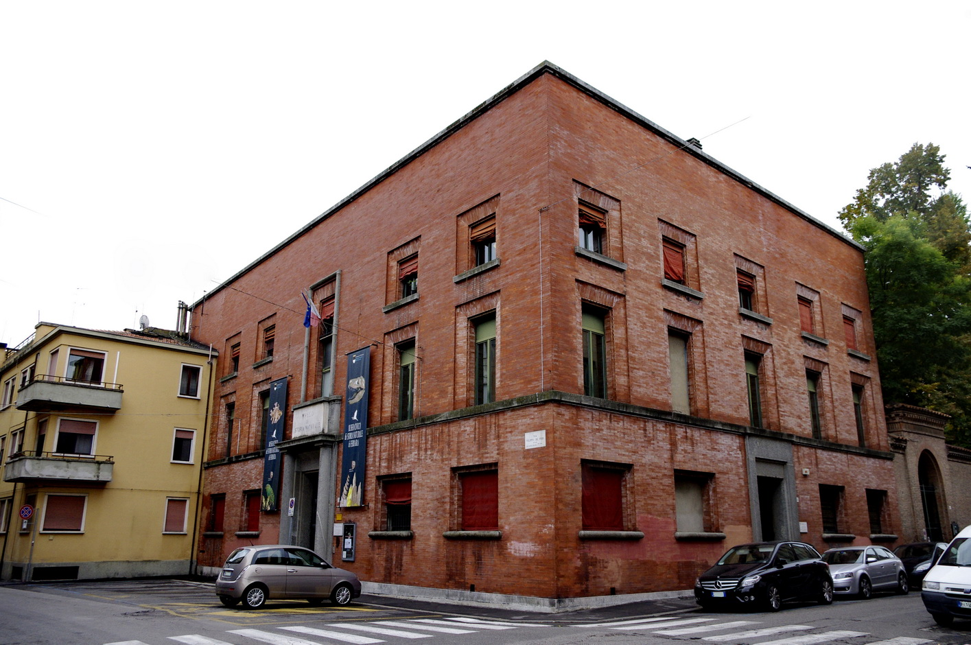 Museo di storia Naturale di Ferrara